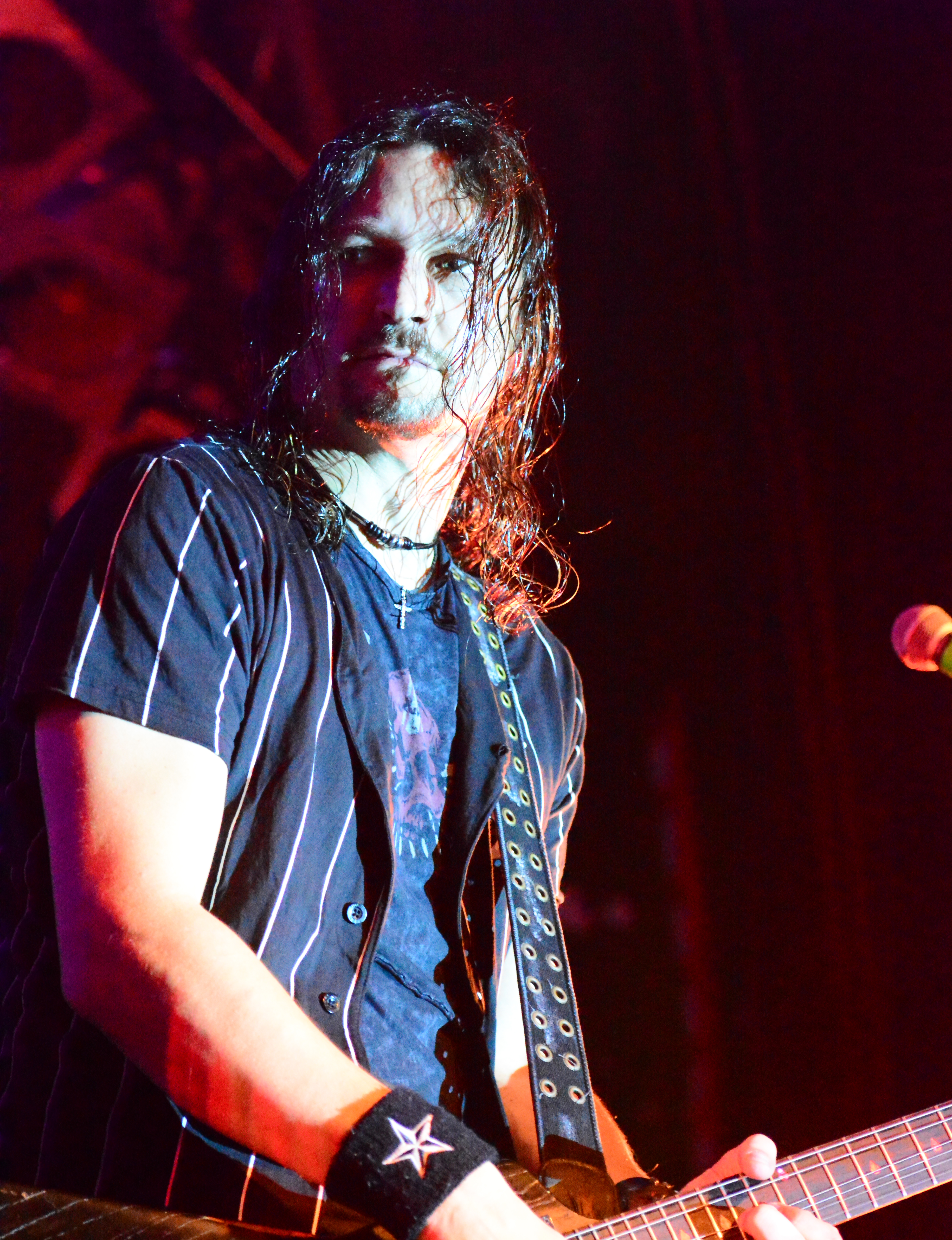 Edguy bei den Hamburg Metal Dayz 2014